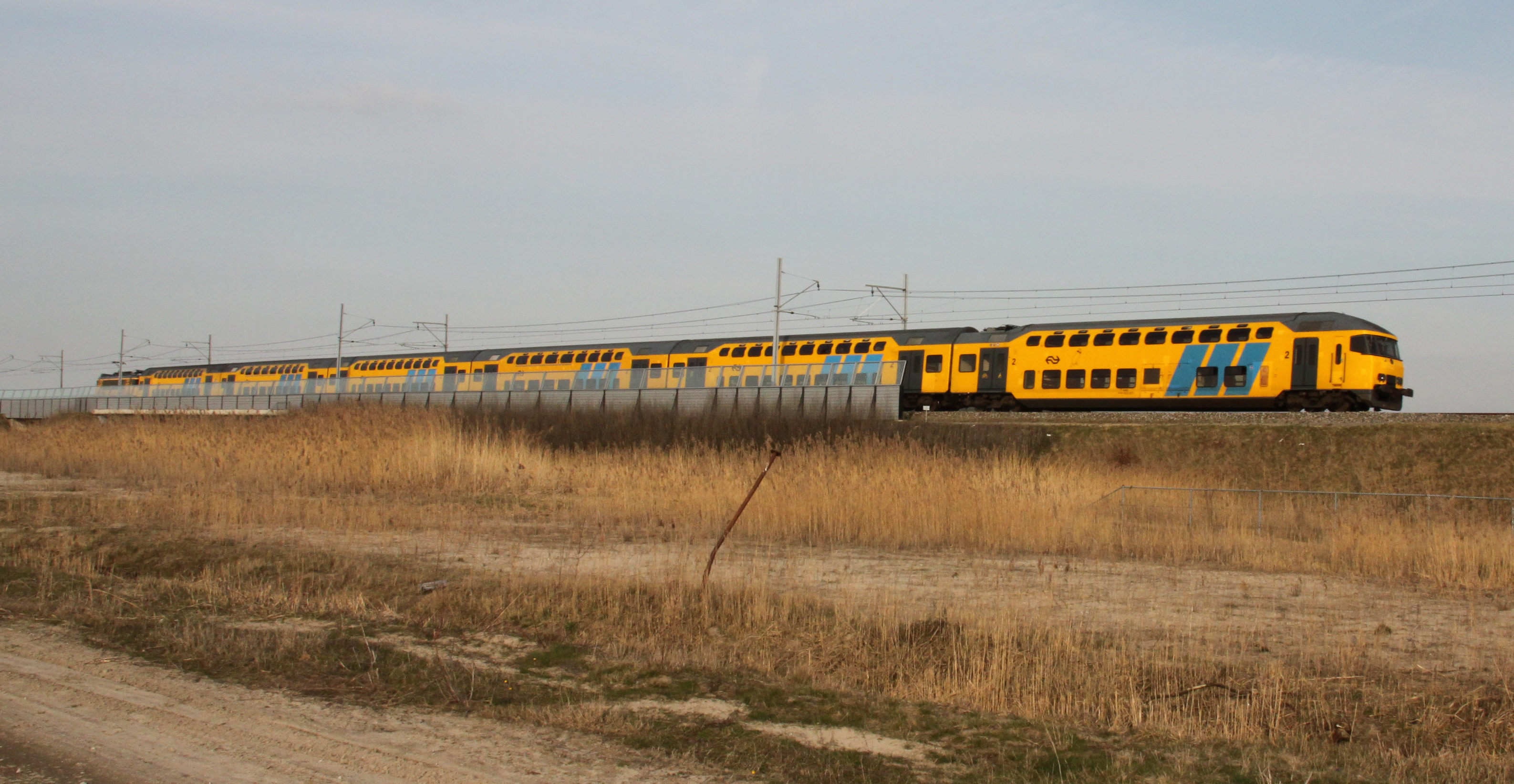 Een treinstam DDM te Almere, Poort bij het toekomstige station.